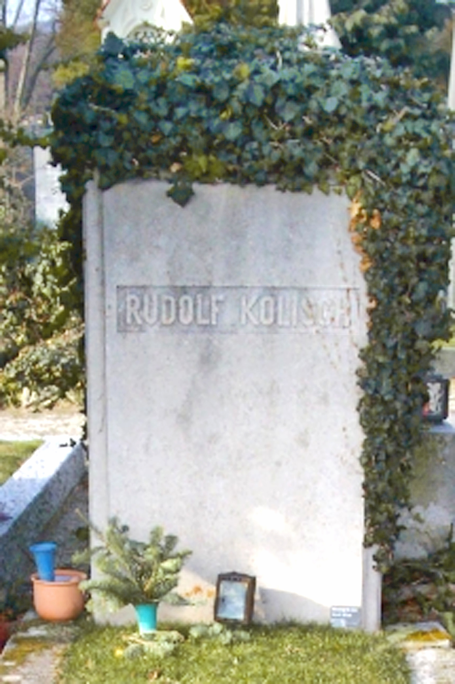 Rudolf Kolisch Grabstätte am Grinzinger Friedhof. Mit die Asche in einer Urne von Rudolf Kolisch (violinist, sein Sohn) begraben bei sein Vater